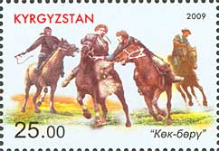 National horse game - Kok-Boru 568, number by Kyrgyz catalogue